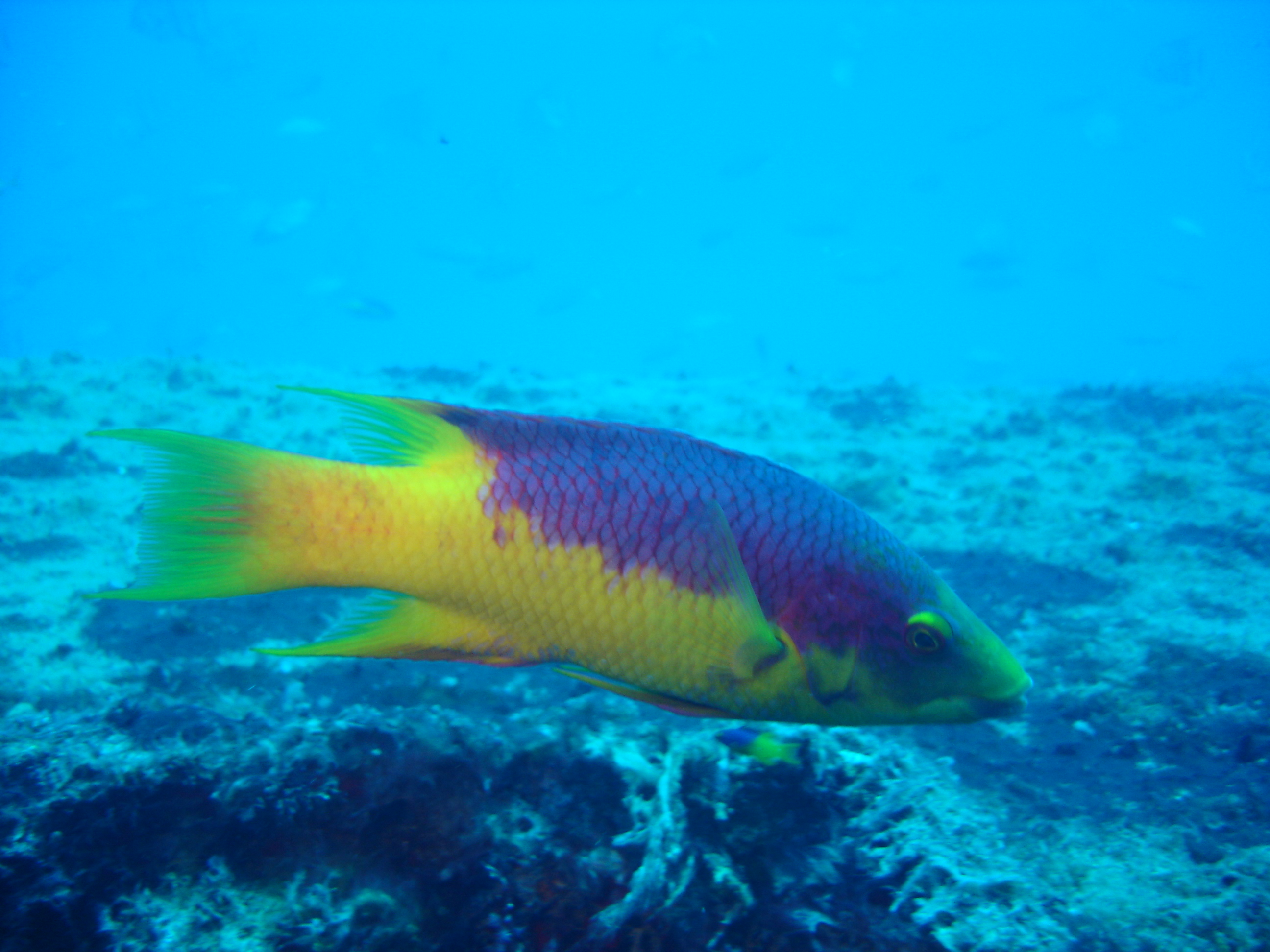 Bodianus rufus, at 30 meters deep, at Porto de Galinhas, PE. Brazil.